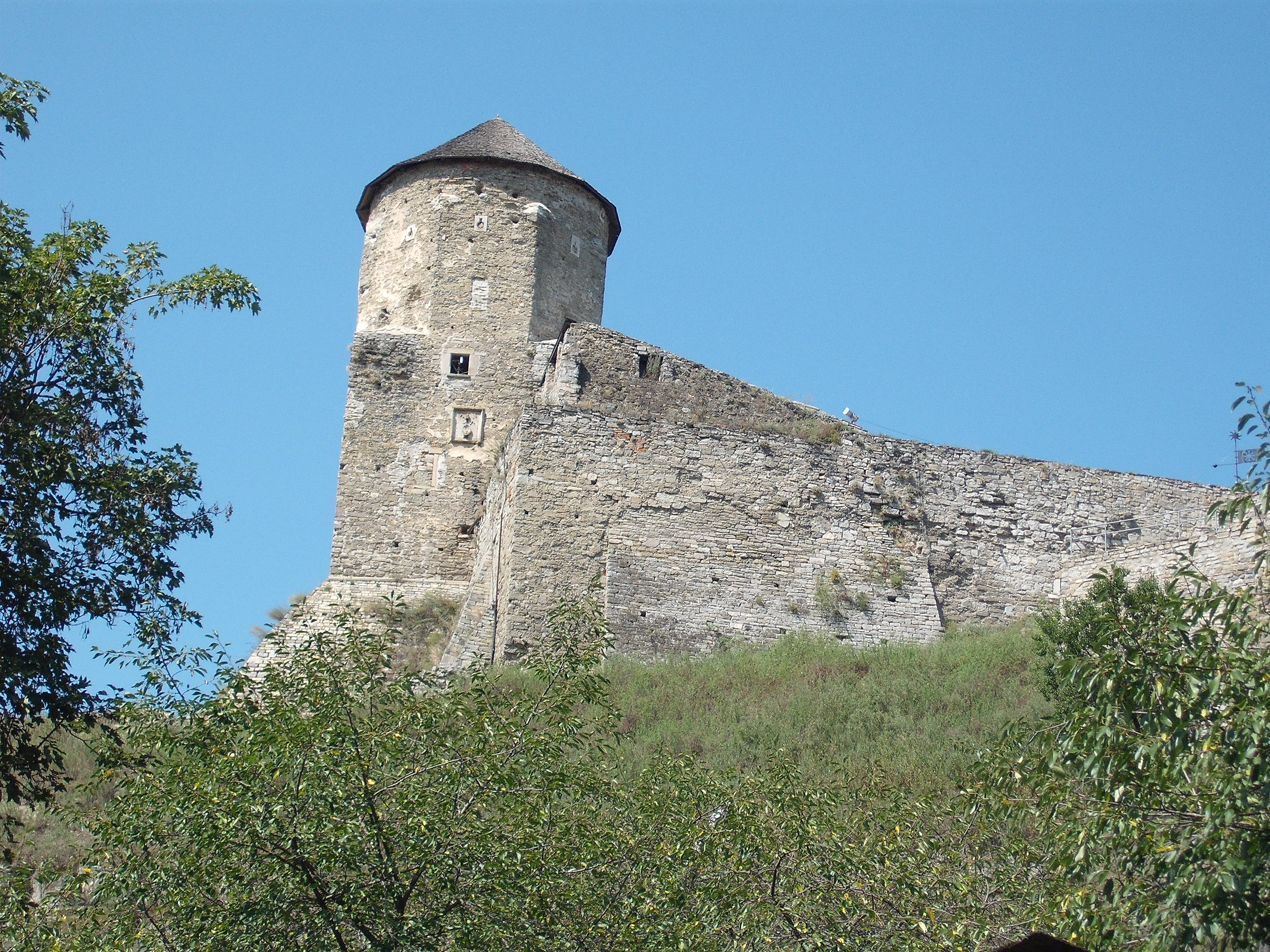 Kamieniec Podolski, Baszta Papieska (zwana też jako "Juliańska") z lat 1503- roku z herbem Della Rovere